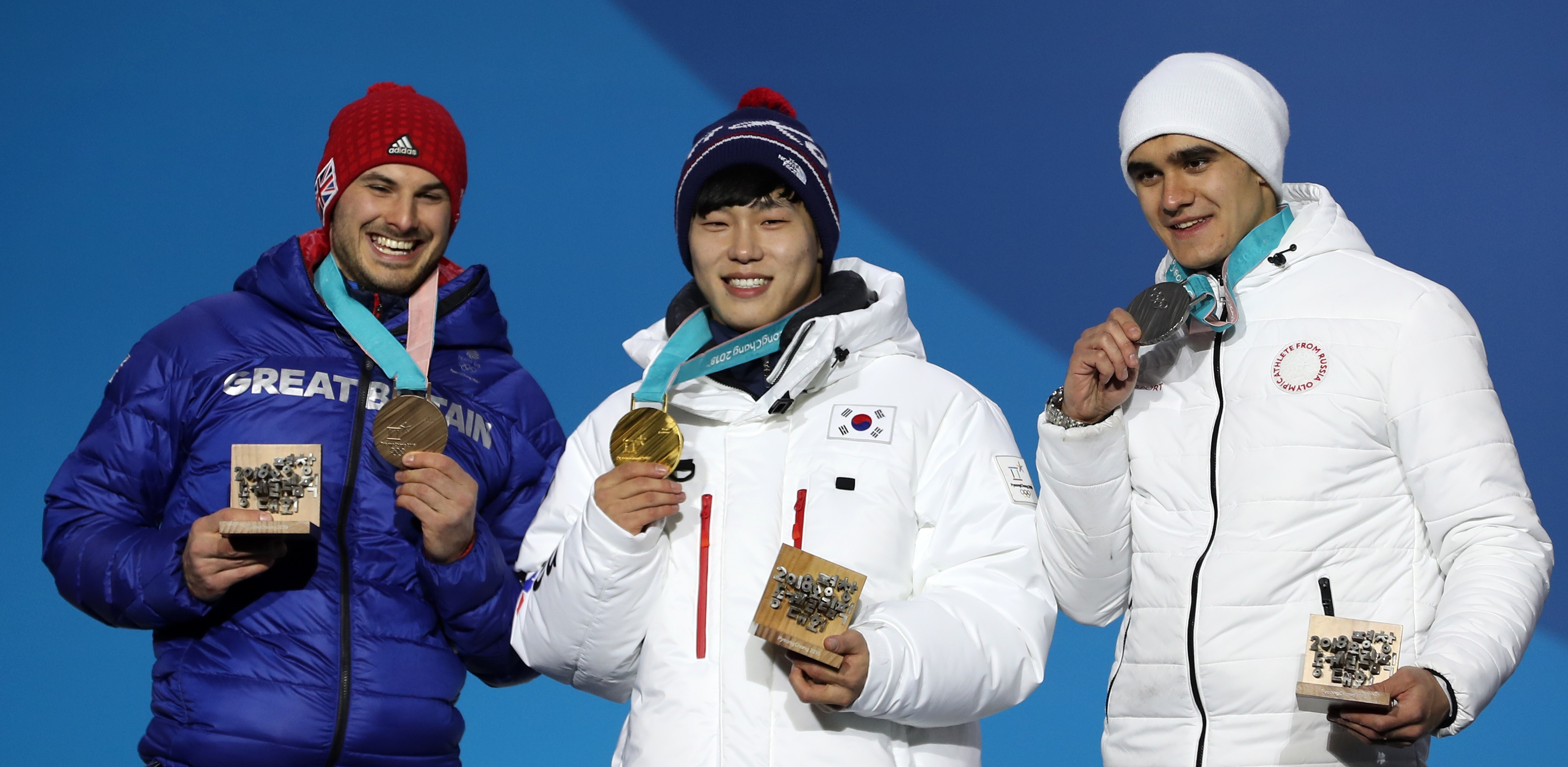 2018 PyeongChang Winter Olympic Games Men’s Skeleton Yun Sung-bin Medal Ceremony February 16, 2018 PyeongChang Medal Plaza, Pyeongchang-gun, Gangwon-do